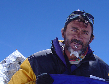 Ricardo Valencia en el monte Makalu, Himalaya.